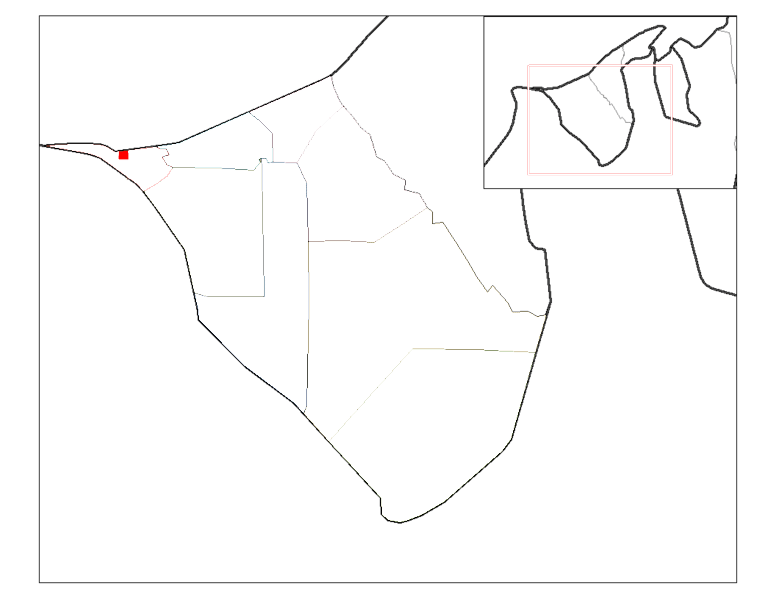 mappa della città del brunei di kuala belait